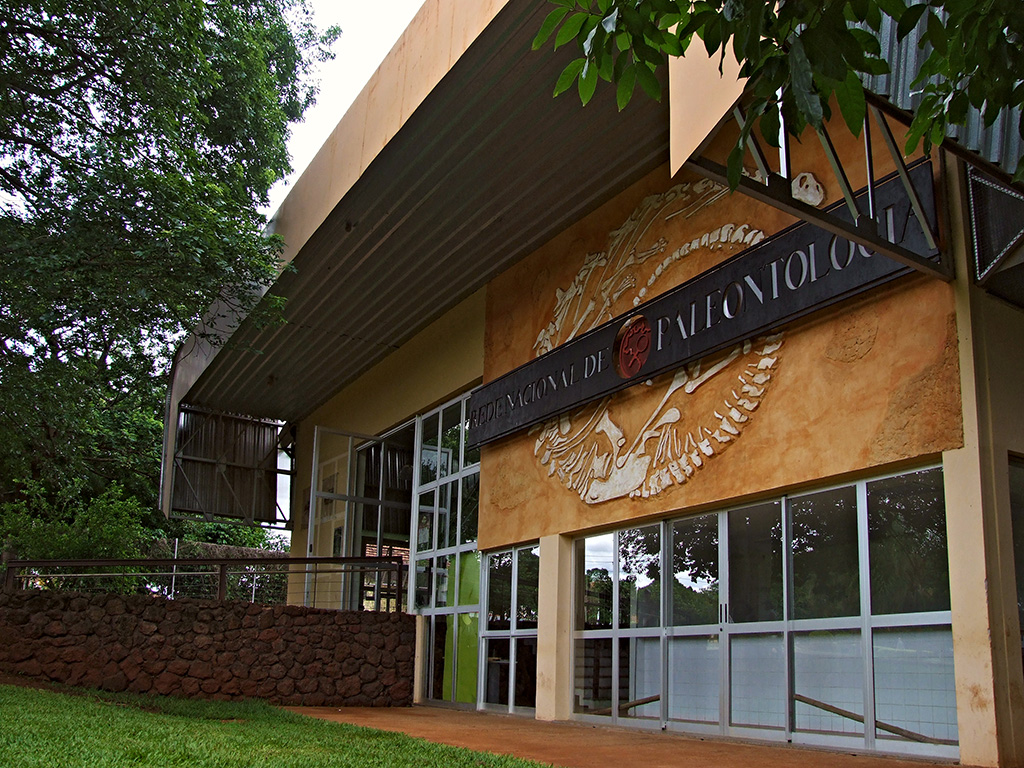 Prédio sede da extinta Rede Nacional de Paleontologia, no bairro de Pairópolis, Uberaba, MG, Brasil